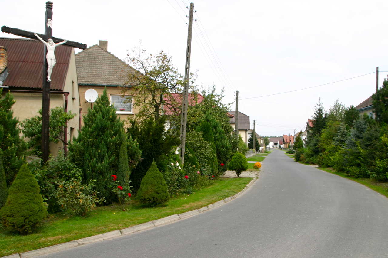 Nowa Wieś Prudnicka (dodatkowa nazwa w j. niem. Neudorf – wieś w Polsce położona w województwie opolskim, w powiecie prudnickim, w gminie Biała.